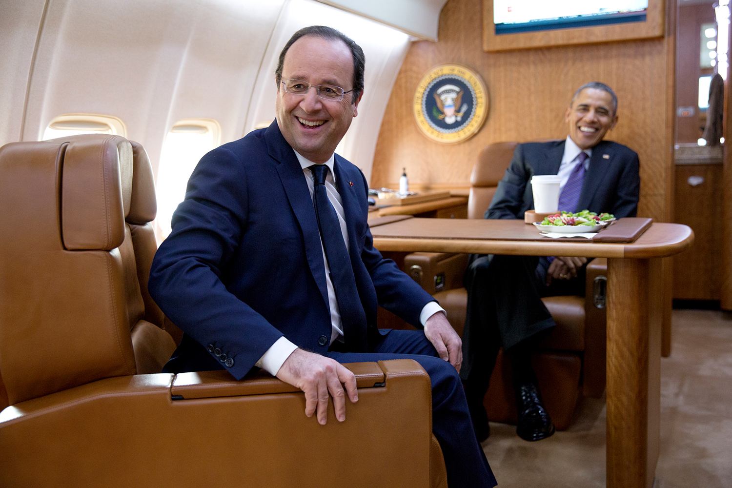 Les présidents François Hollande et Barack Obama à bord d'Air Force One, en route pour la résidence de Thomas Jefferson au domaine de Monticello, 10 février 2014.